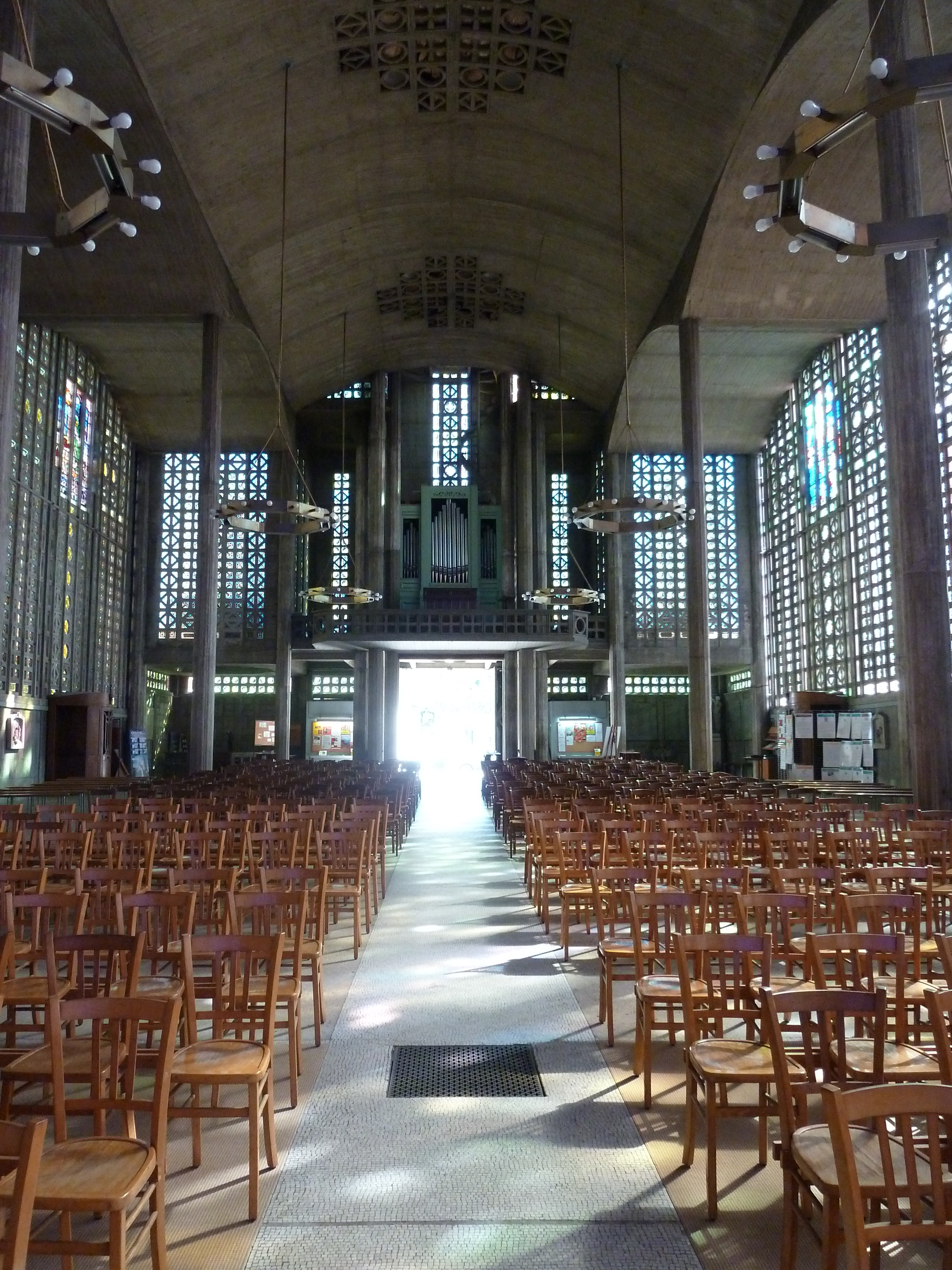 Église Notre-Dame du Raincy - Le Raincy - Seine-Saint-Denis - France - Mérimée PA00079948 .